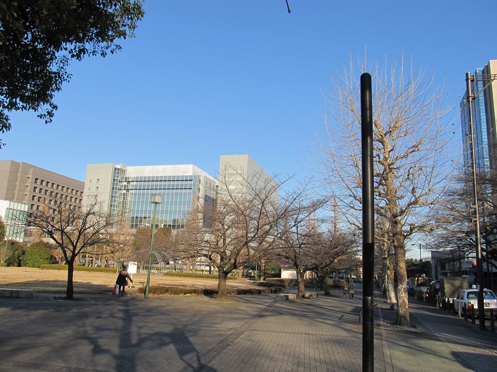 すずかけ公園より日本製鋼所東京製作所跡地、府中インテリジェントパーク（Jタワー）周辺。東京都府中市日鋼町。